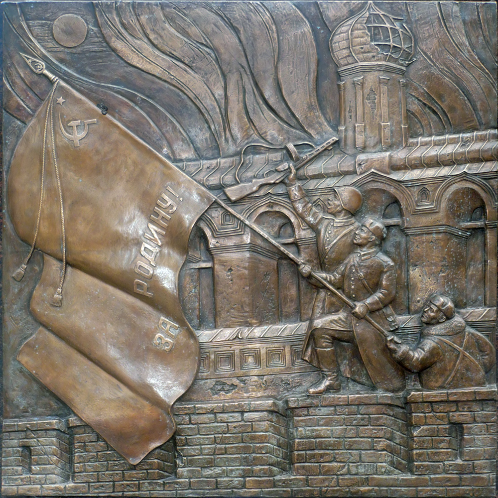 Барельеф со стелы «Город воинской славы» (Великий Новгород)»: 1944 г.,20 января. Освобождение Новгорода войсками Красной Армии в ходе Новгородско-Лужской операции